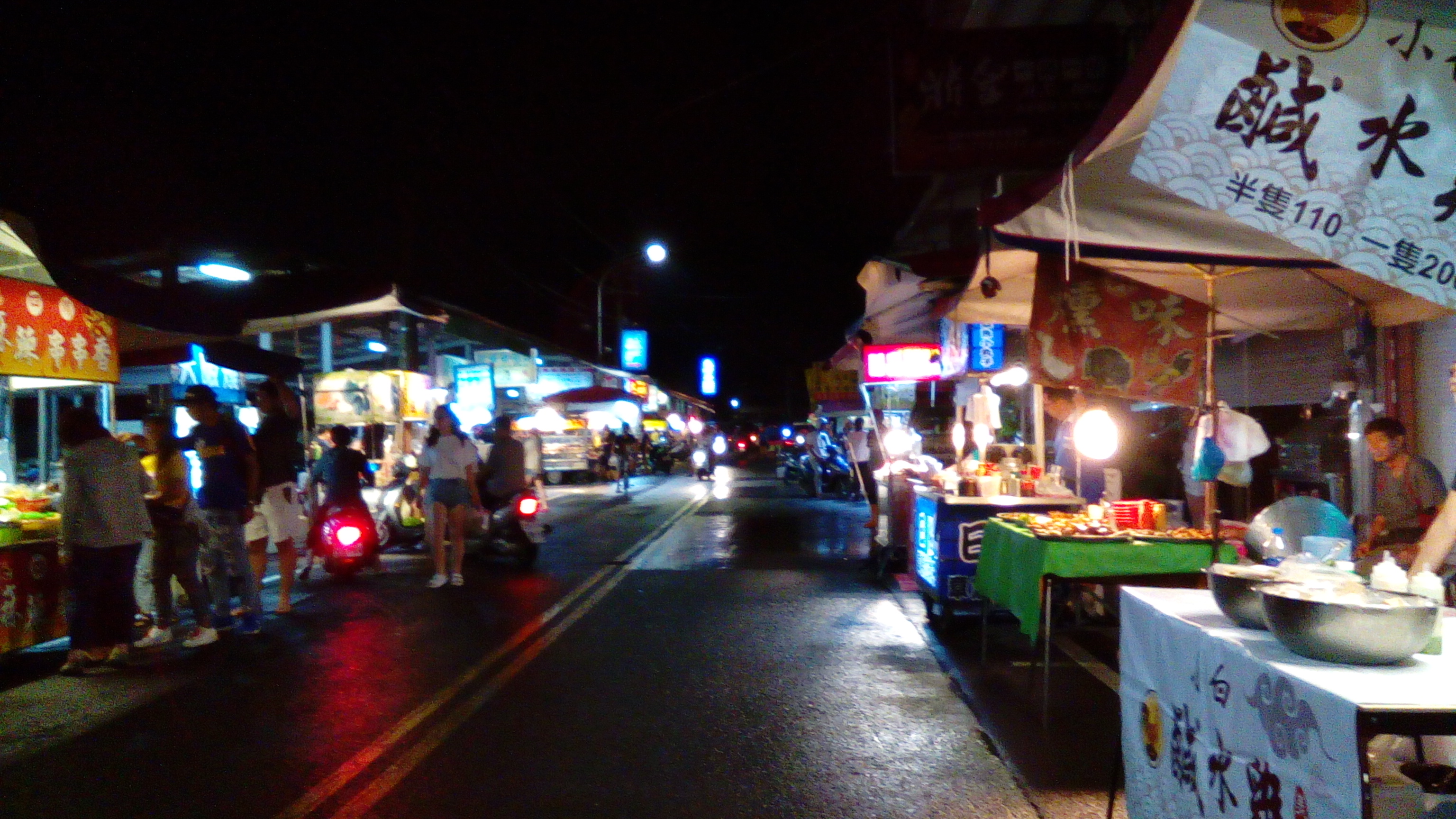 雨後的夜市 攤位較為稀少 但有一種雨中市集的fu